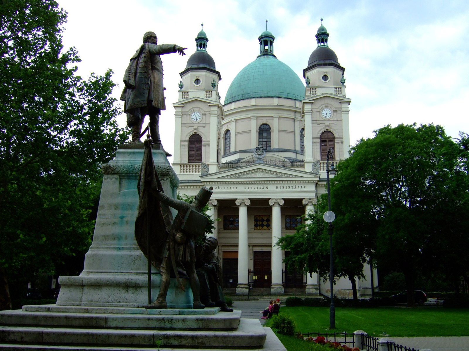 Református templom (Cegléd, Szabadság tér 3.) This is a photo of a monument in Hungary. Identifier: 6944